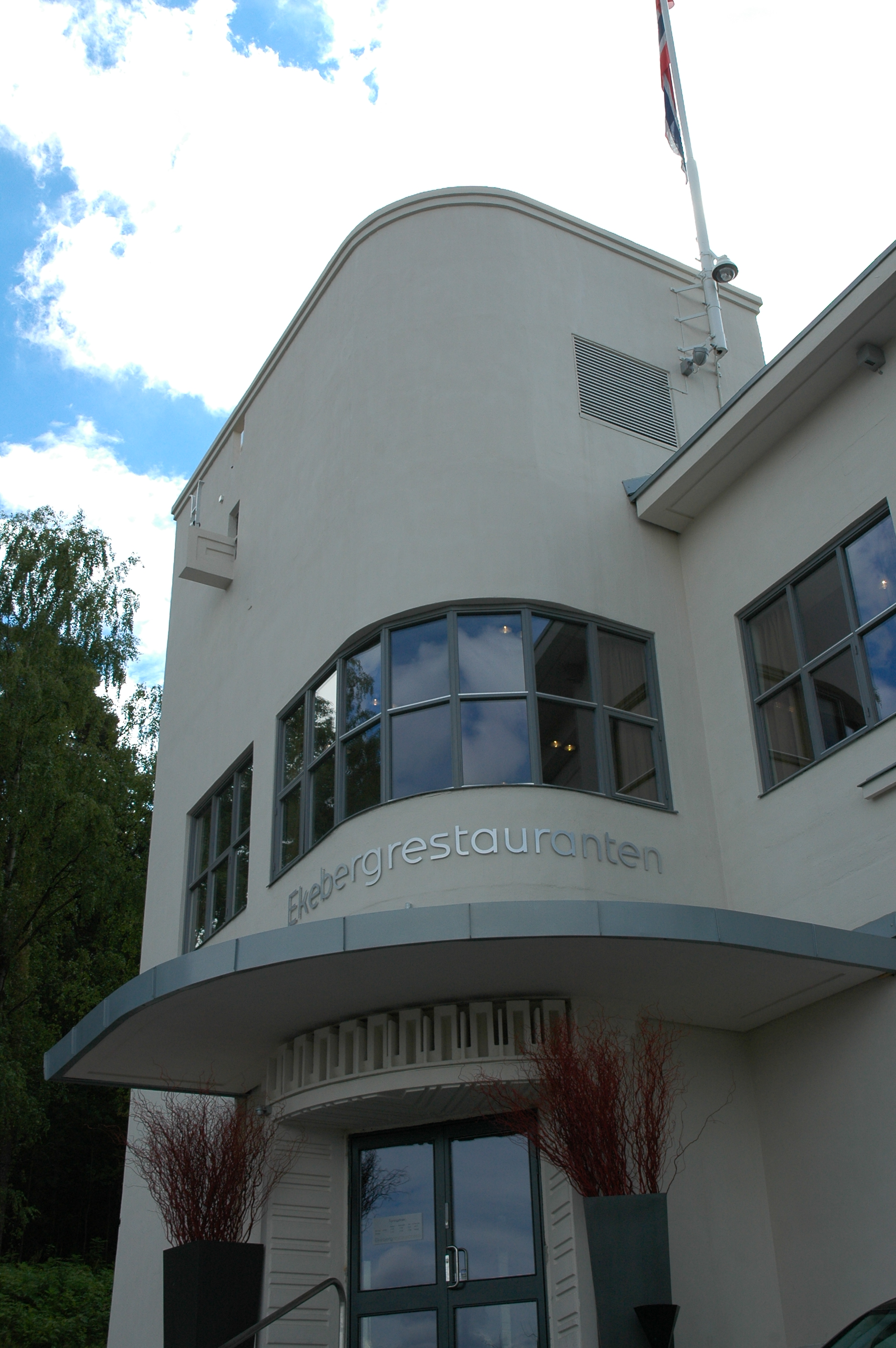 Ekebergrestauranten Oslo